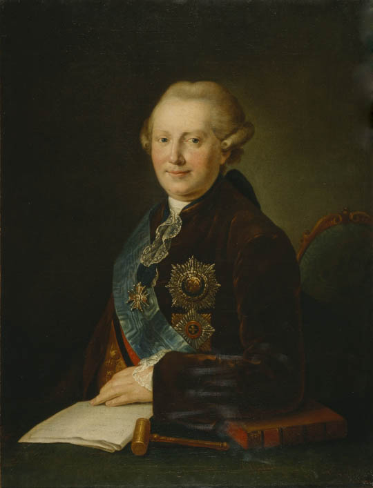 Вяземский, Александр Алексеевич (1727—1793) — князь, государственный дея- тель, сенатор.